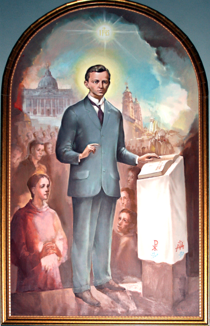 Slika Ivana Merza u Bazilici Srca Isusova u Zagrebu